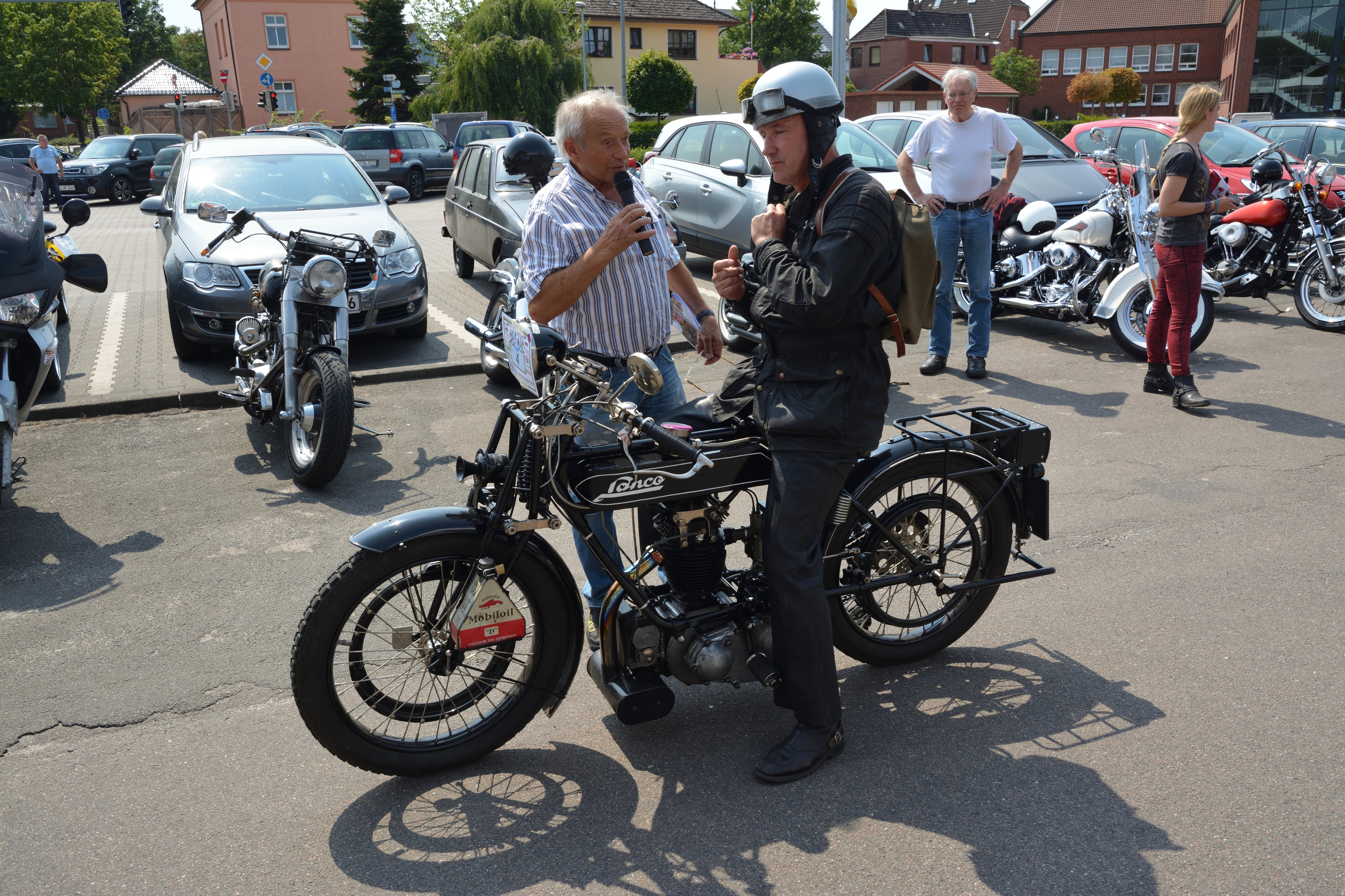 Impressionen der "Zehnten Internationalen VFV ADAC Zwei-Tage-Motorrad-Veteranen-Fahrt-Norddeutschland" und der "33ten Int-Windmill-Rally" 2018 in Wilster. Teilnehmer- und Modelliste Leider standen die Maschinen am Breakpoint entweder extrem dicht oder die Teilnehmer fuhren schnell wieder ab. Alle Maschinen mussten vor 1945 gebaut sein.